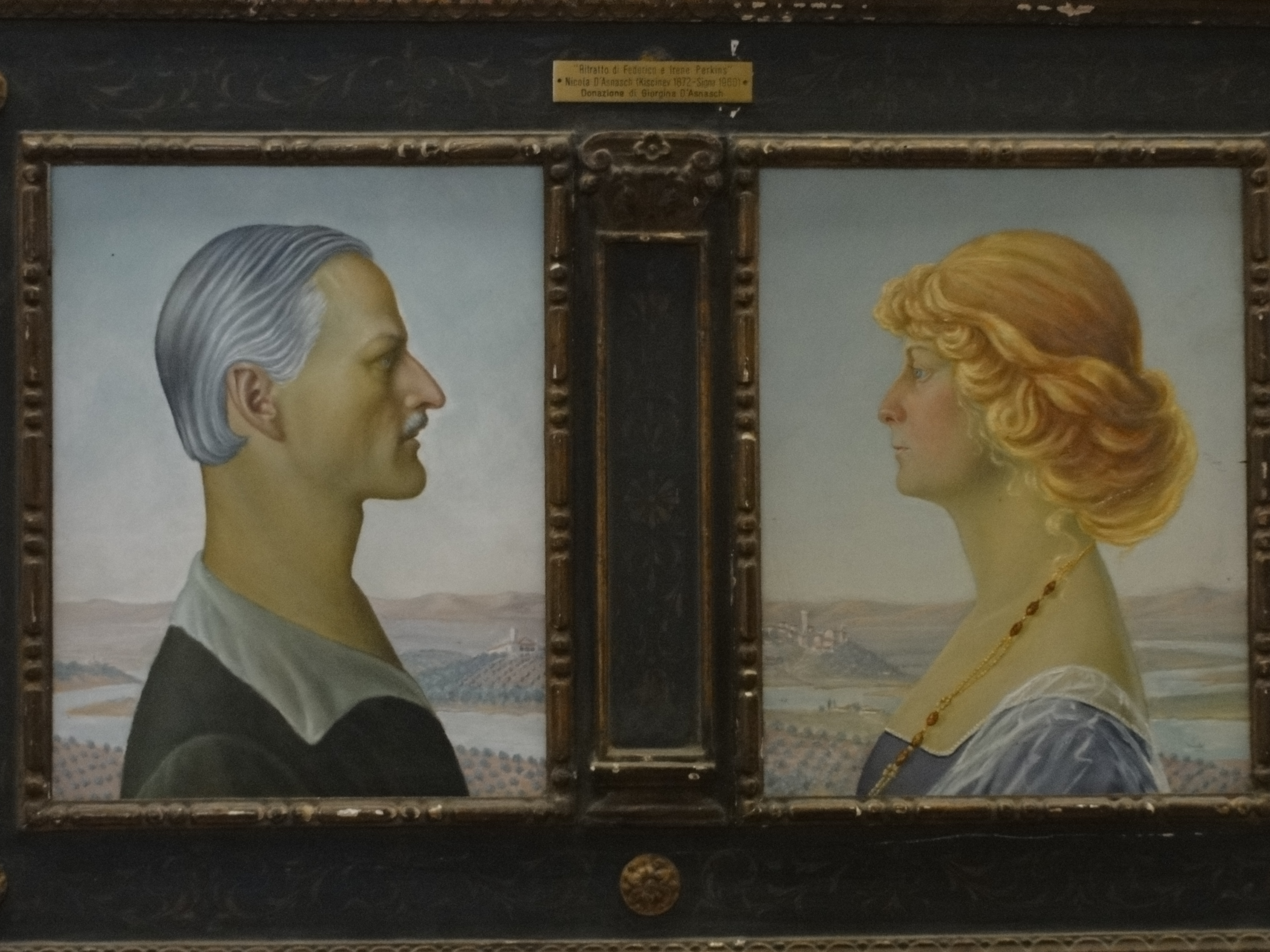 Assisi, Museo del Tesoro della Basilica di San Francesco, Ritratto di Federico e Irene Perkins, dipinto di Nicola D'Asnasch (1872-1960)